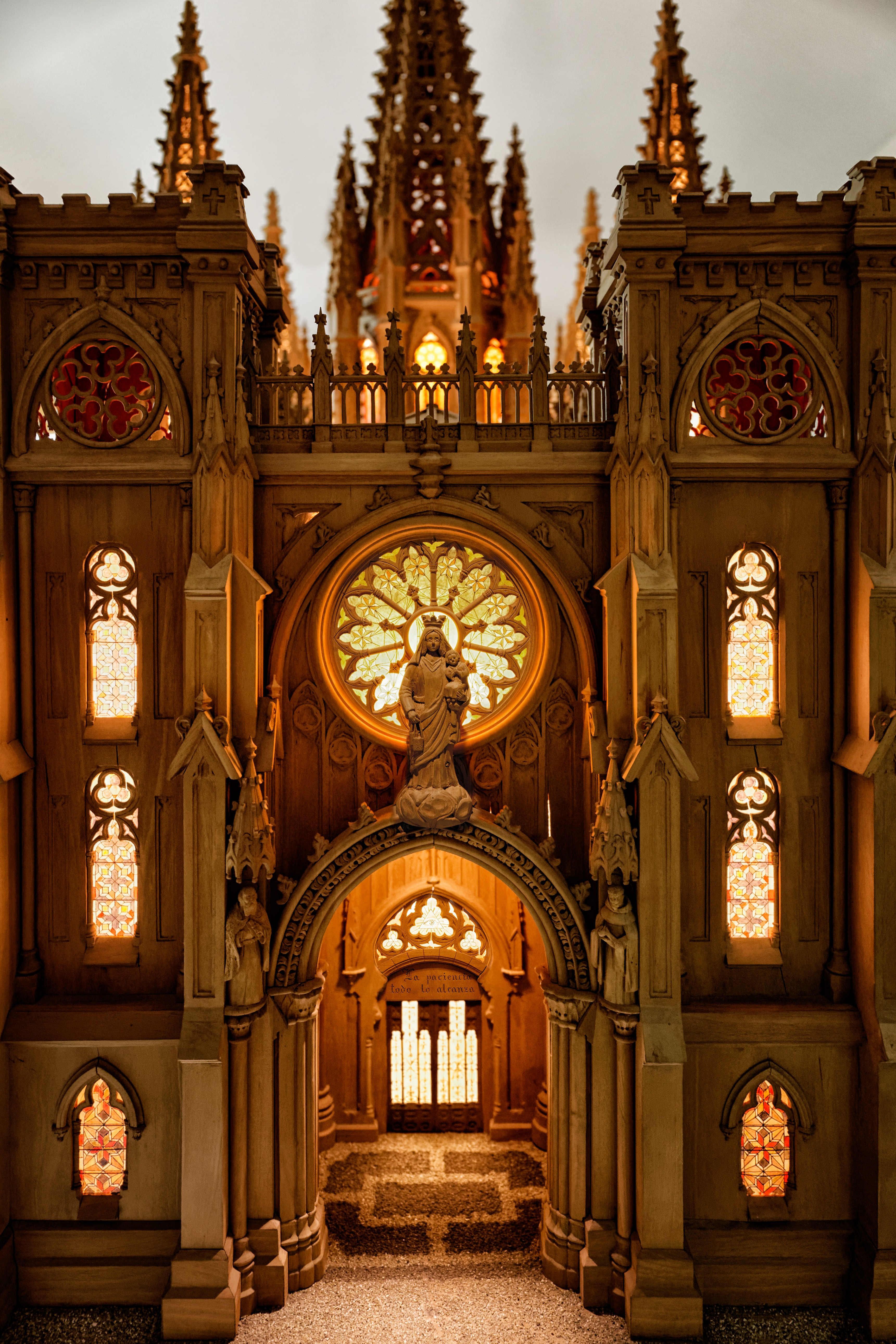 Frente Maqueta de Santa Teresa de Jesús (Jerónimo Cotobal). Foto: RMorato